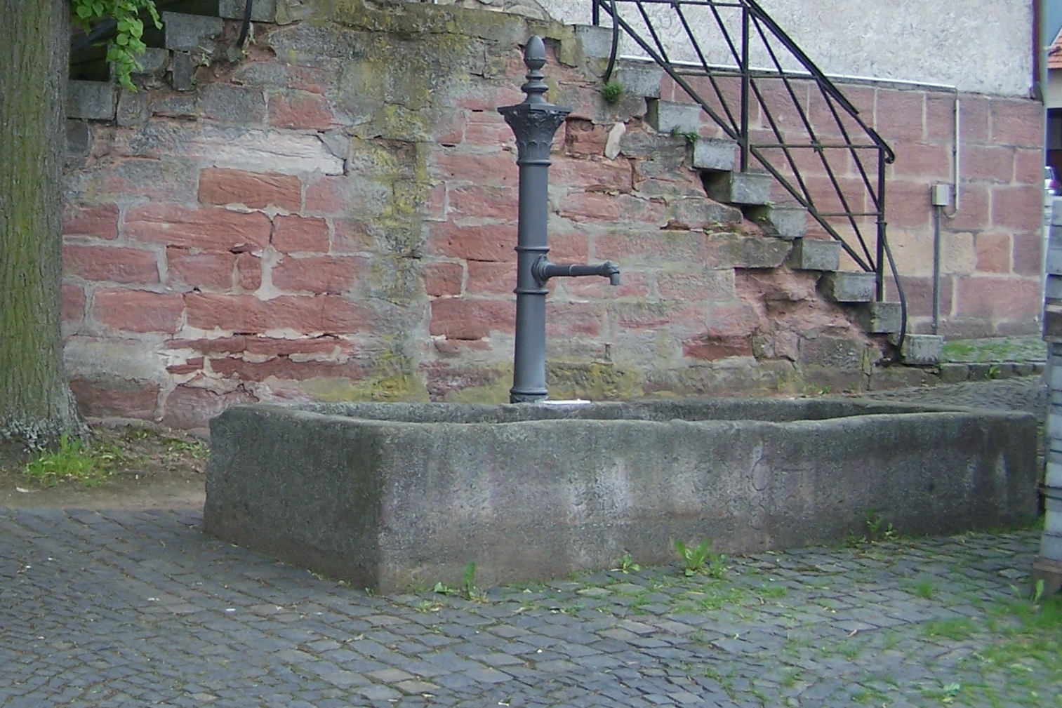 Brunnen unweit der Kirche in der Ortslage Urnshausen.